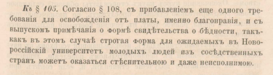 [Фойгт, К. К.]. Проект устава и штата Императорского Новороссийского университета в городе Николаеве / [Карл Карлович Фойгт]. – Санктпетербург: в типографии Императорской академии наук, 1862. – 74, [2] с.